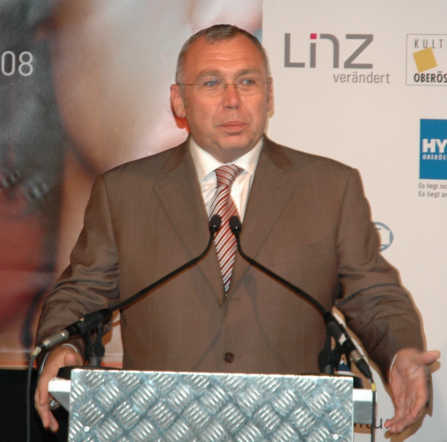 Österreichischer Bundeskanzler Alfred Gusenbauer bei der Eröffnungsrede am Crossing Europe Filmfestival 2008 in Linz, Oberösterreich